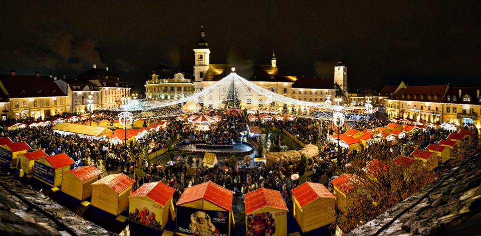 fotografie de la Târgul de Crăciun din Sibiu, ediția 2014